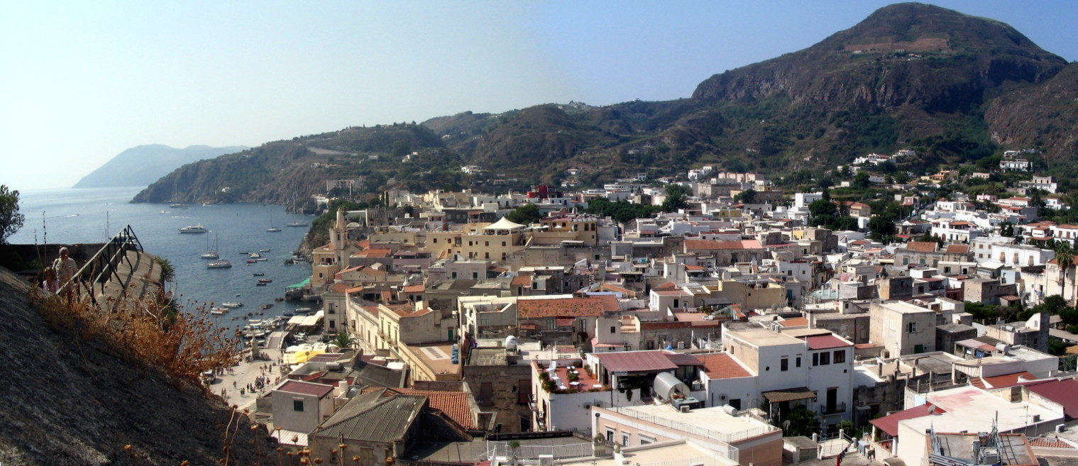 Lipari, Sicilia, Italia